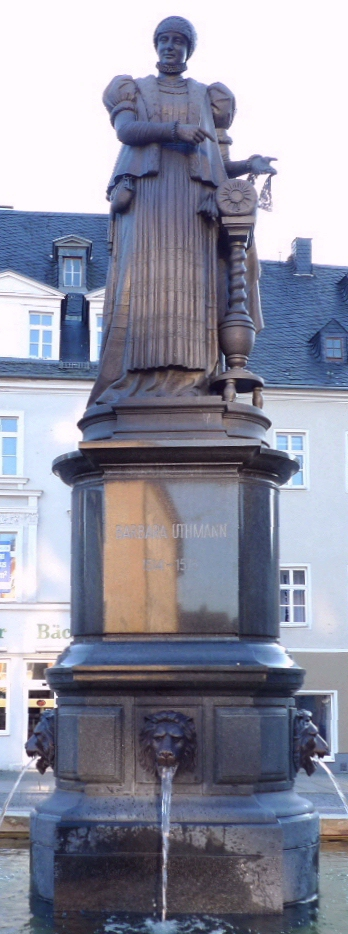 Robert Henze: Barbara Uthmann - Denkmal in Annaberg-Buchholz